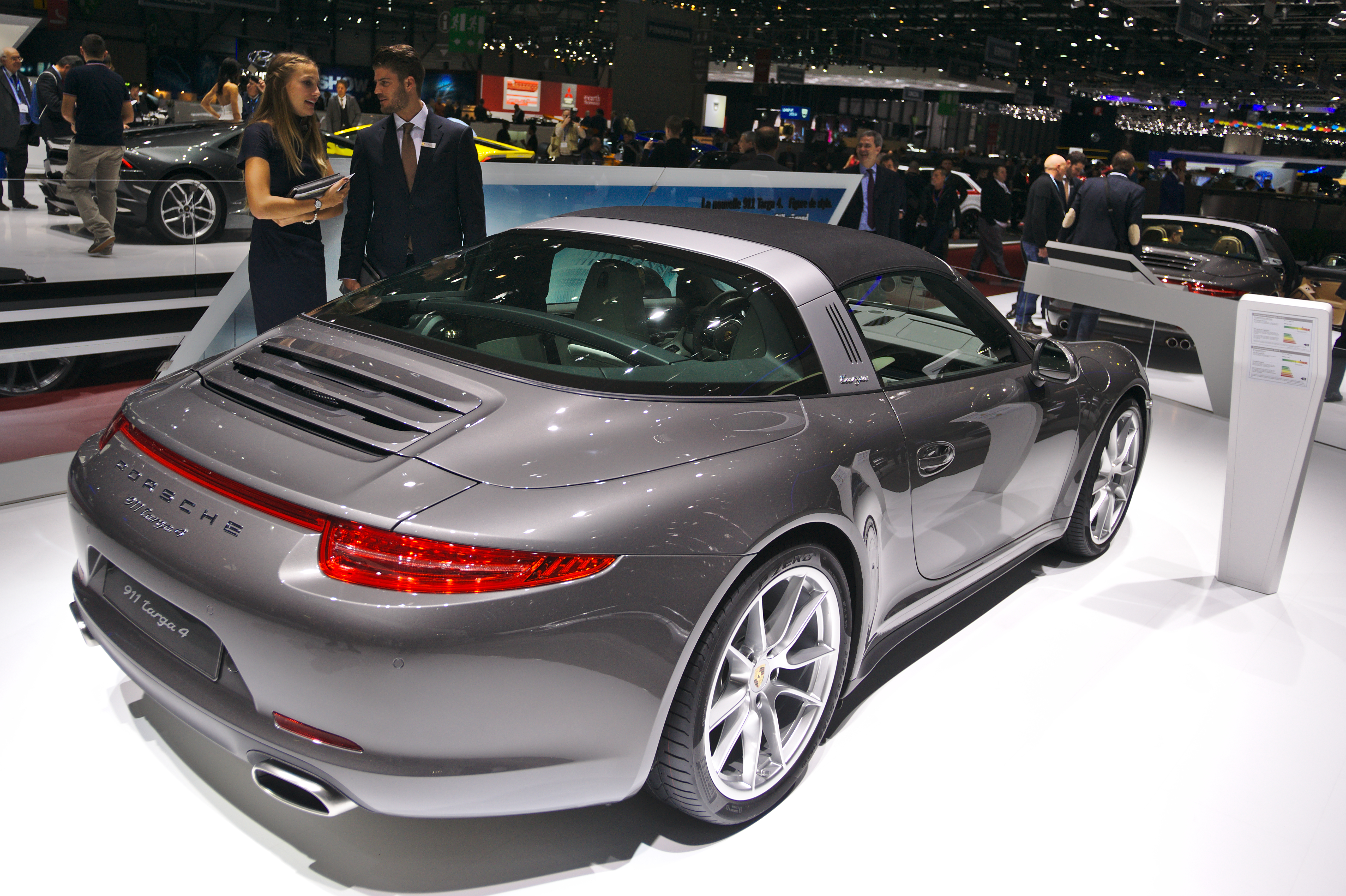 Salon de l'auto de Genève 2014 - 20140305 - Porsche 911 Targa 4